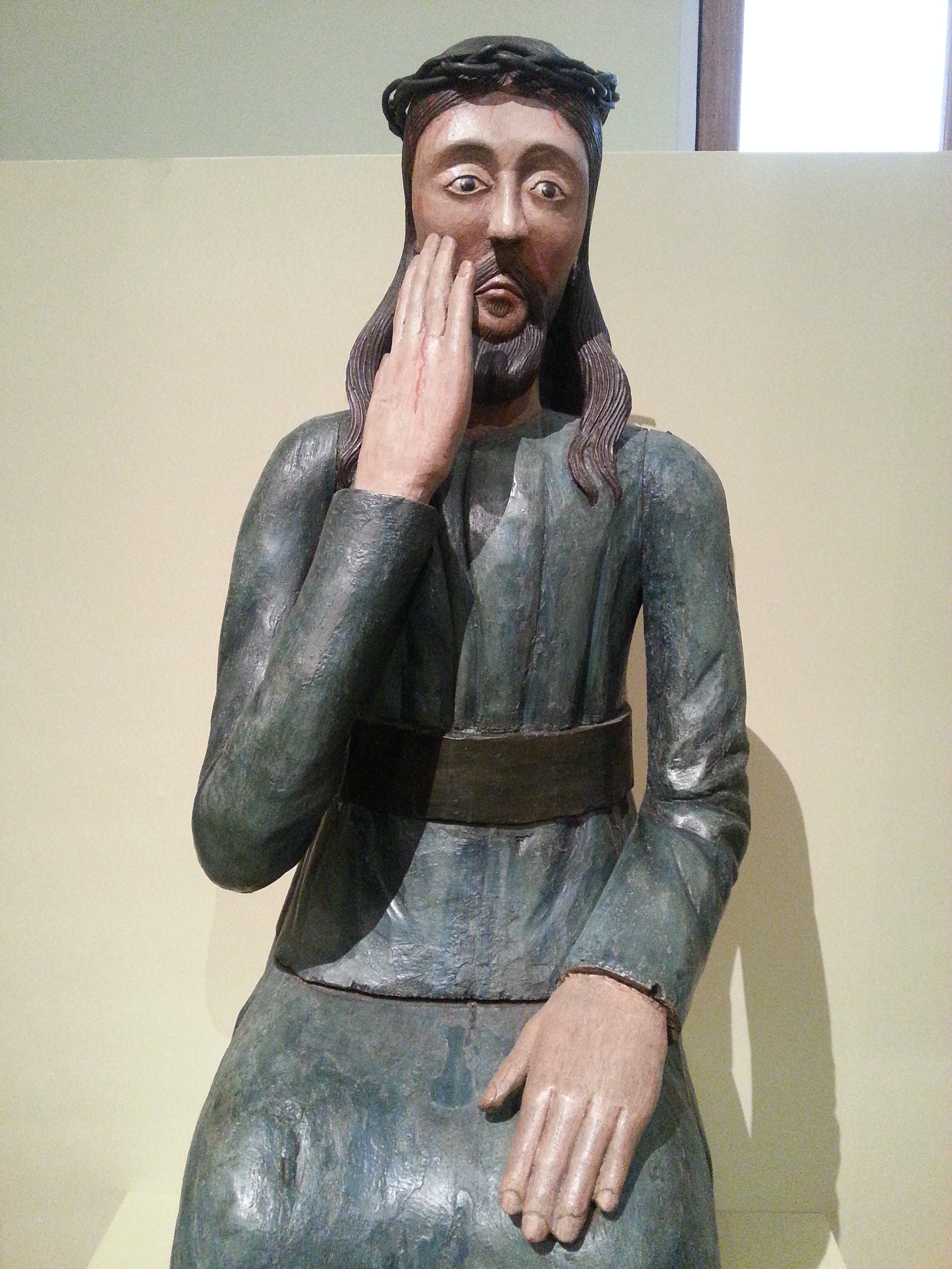 На выставке памятников пермской деревянной полихромной скульптуры в ГИМ (Москва) «Христианские древности Пермского края»